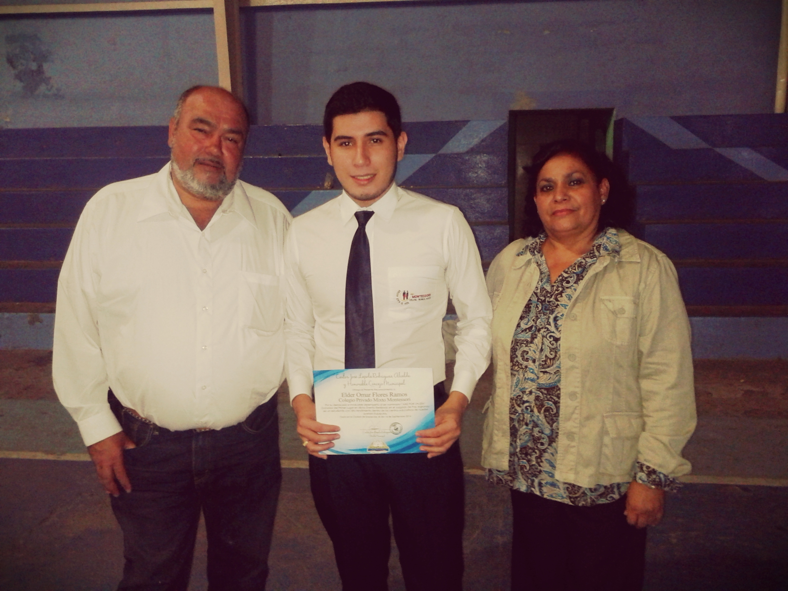 Carlos José Lapola Rodríguez, alcalde municipal de Esquipulas por el período 2012-2016, junto a la Síndico Primero Alma Morales de Morales y el estudiante Elder Flores Ramos.